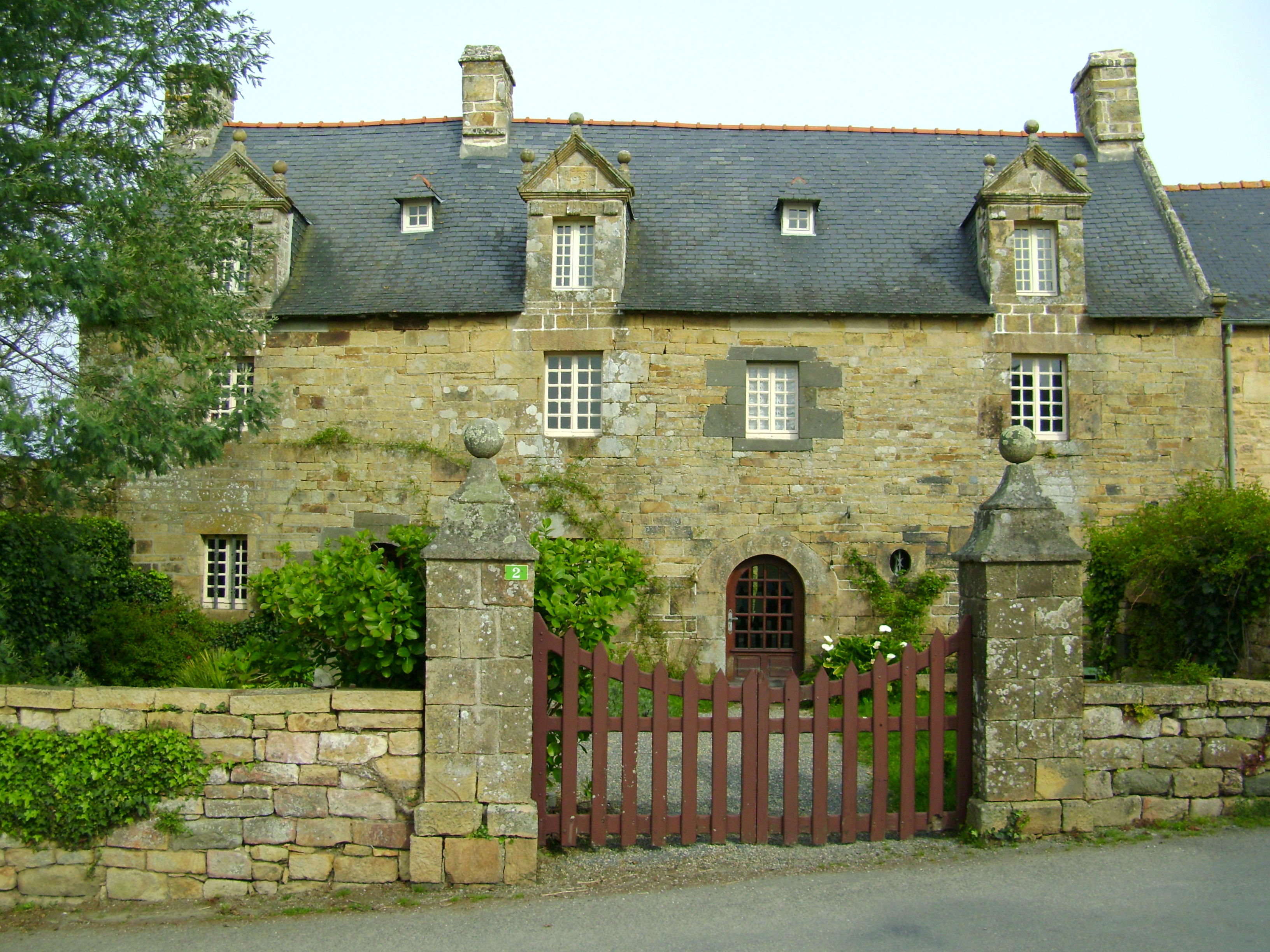 Le manoir du bourg.JPG